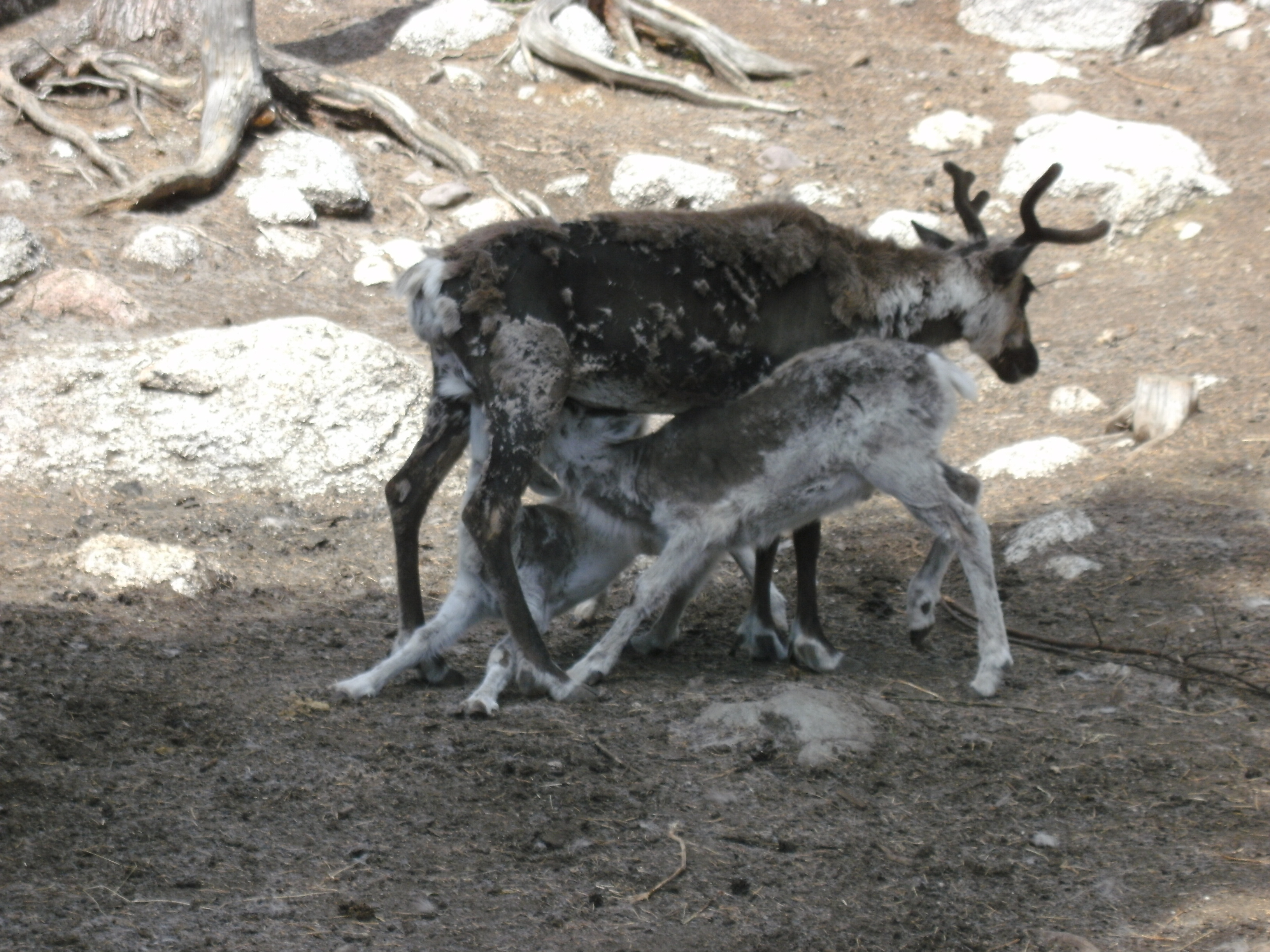 Junsele djurpark. Ett djur.